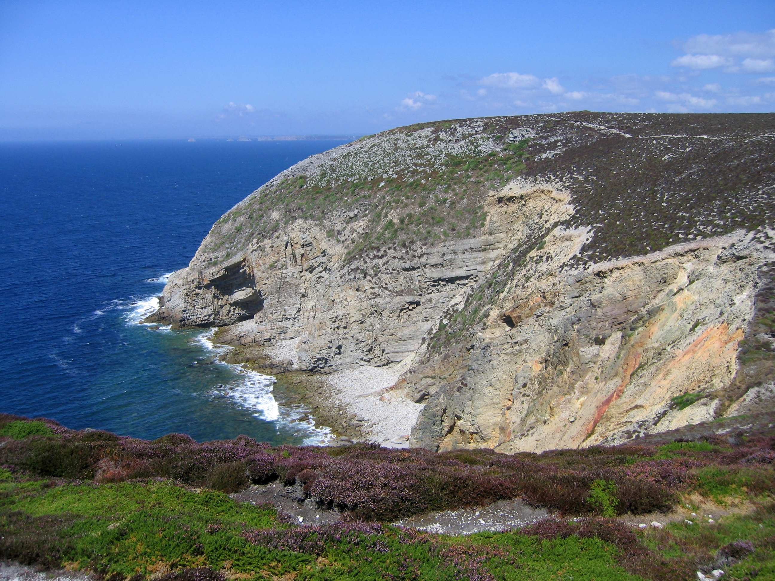 Crozon cap de la Chèvre Bretagne France